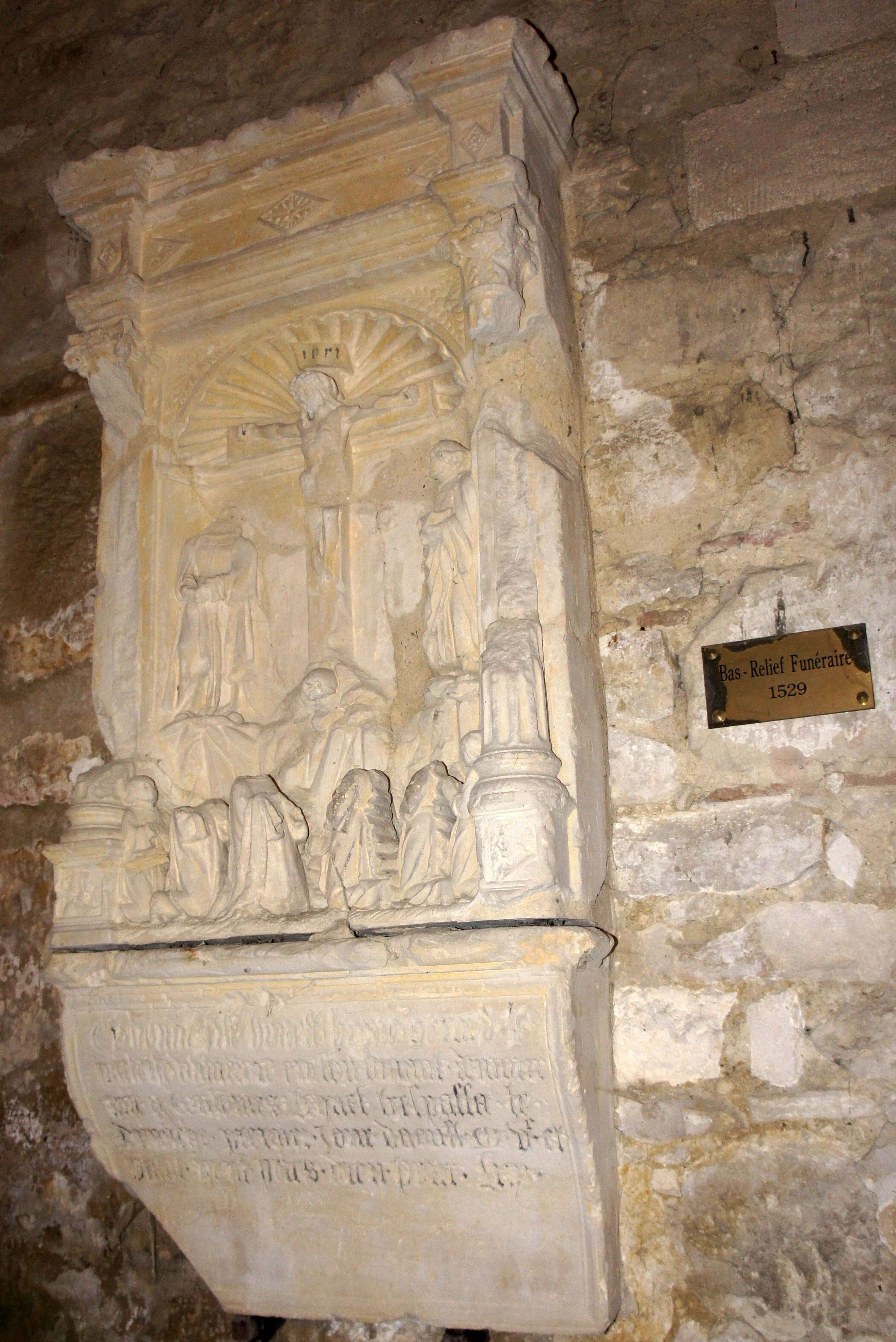 en l'église du village.